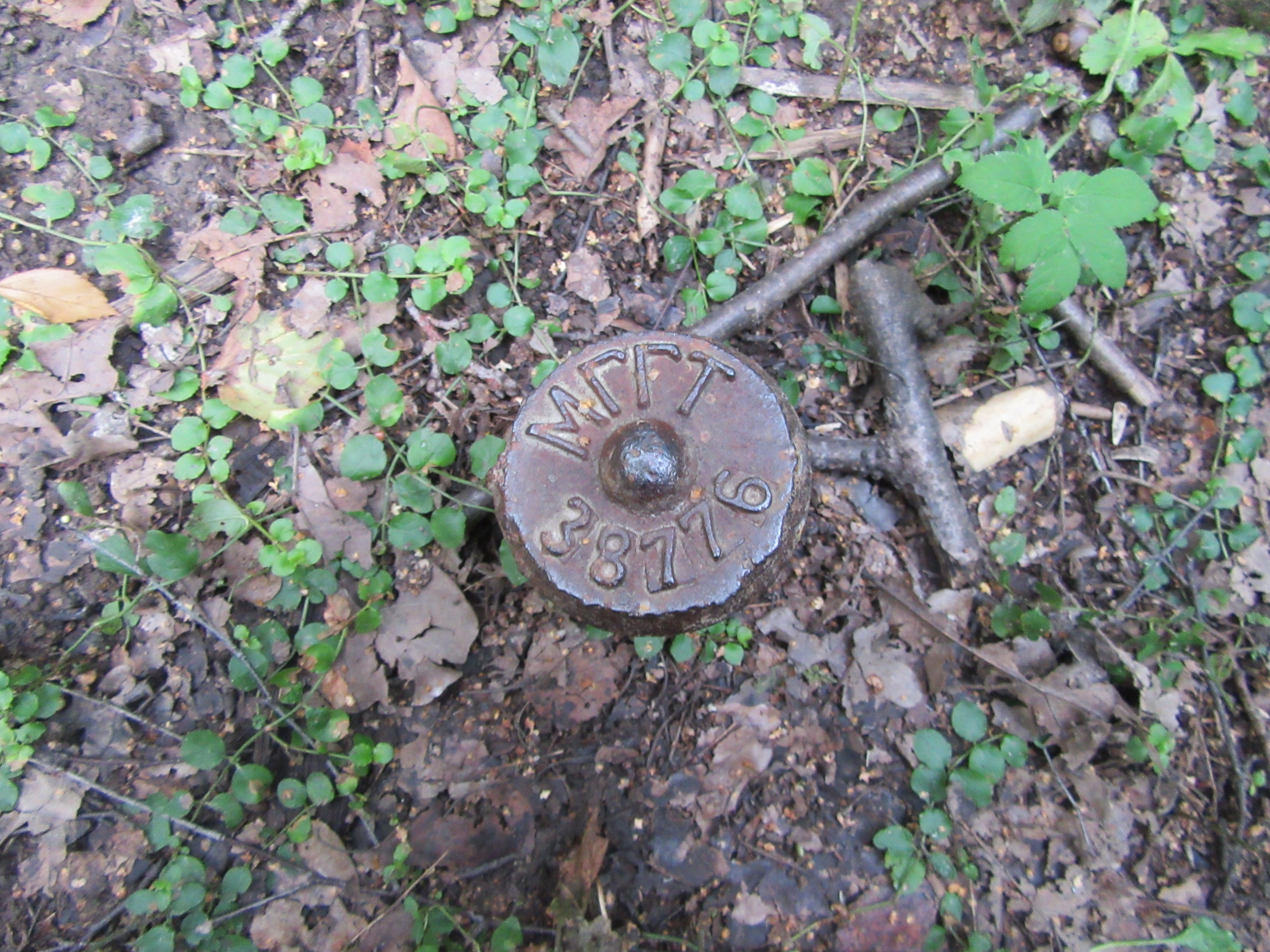 Металлический, вбит в землю